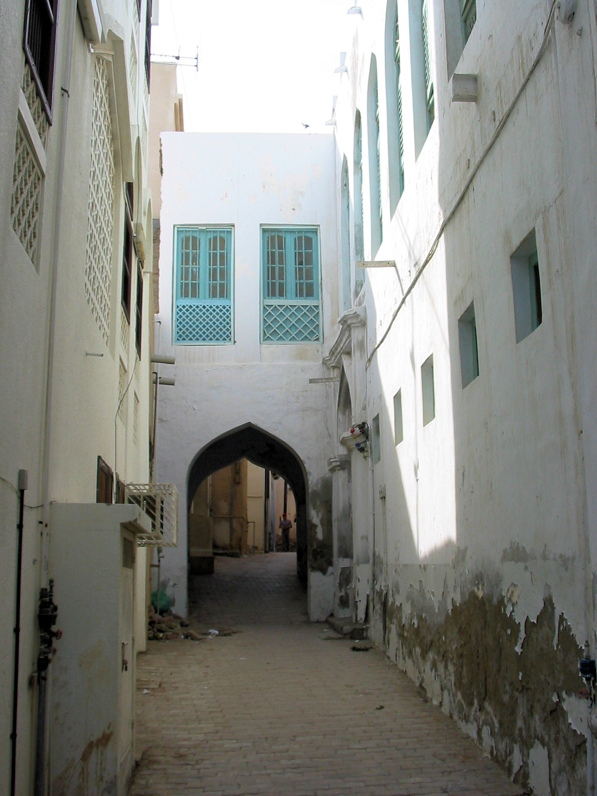 Matrah (Oman)